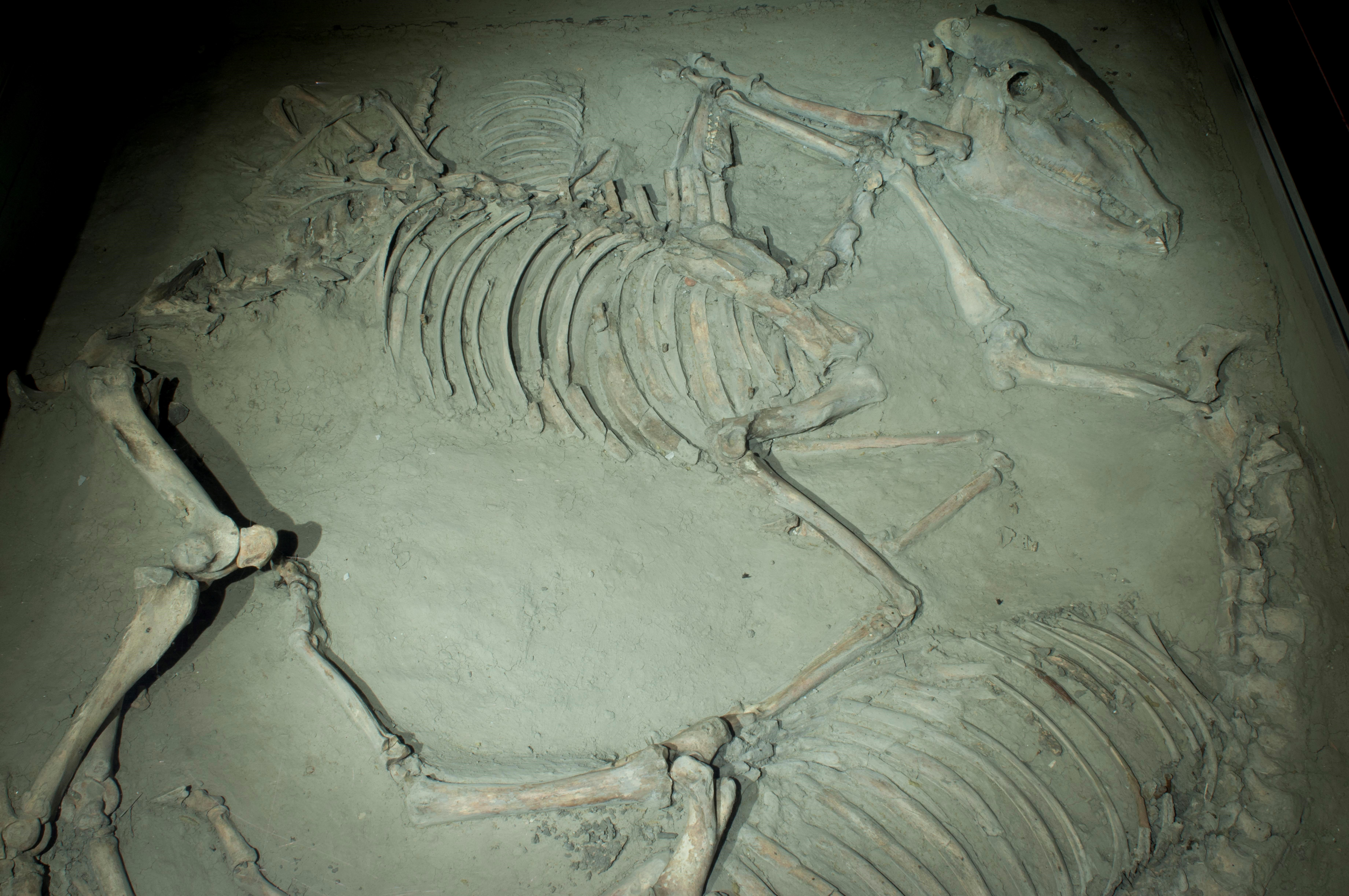 Deel van het paardengraf in Ezinge. Afkomstig uit de wierde De Bouwerd.